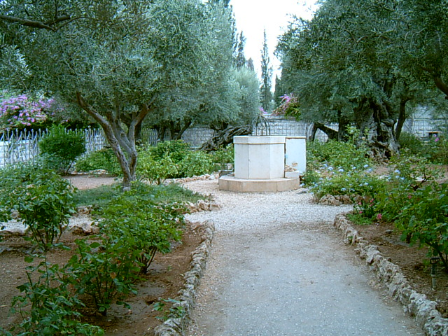 digitalna slika. Vrt Getsimane.